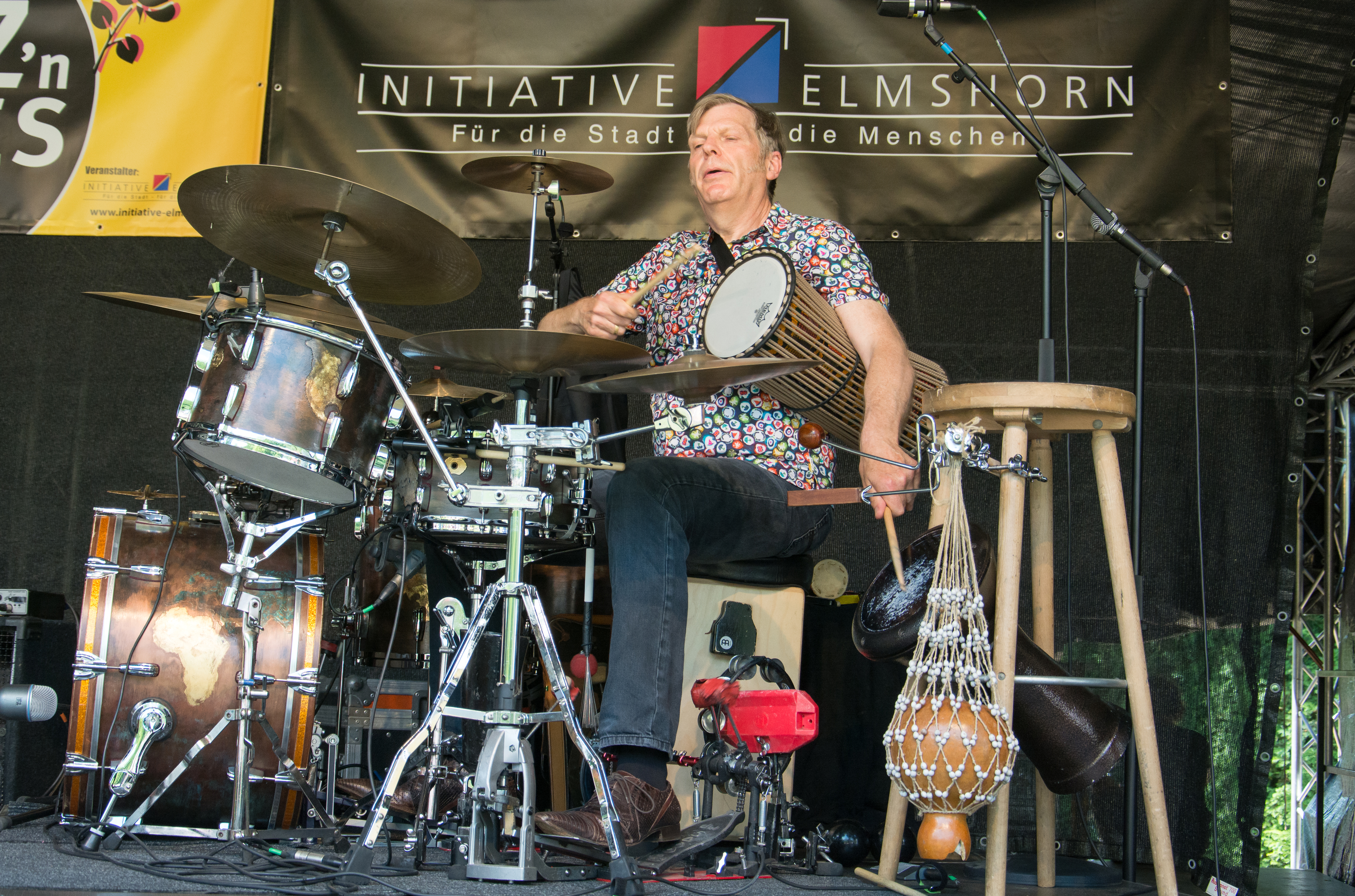 New Orleans Shakers feat. Ralf Böcker beim Jazz'n Roses in Elmshorn 2017